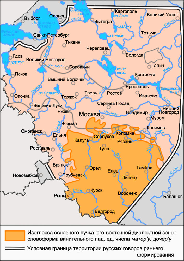 Карта основного пучка юго-восточной диалектной зоны русского языка. Источники: Захарова К. Ф., Орлова В. Г. Диалектное членение русского языка — 2-е изд. — М.: Едиториал УРСС, 2004. — ISBN 5-354-00917-0, с. 103—104. Язык русской деревни. Диалектологический атлас. — Наречия и диалектные зоны. Бромлей С. В., Булатова Л. Н., Захарова К. Ф. и др. Русская диалектология / Под ред. Л. Л. Касаткина — 2-е изд., перераб. — М.: Просвещение, 1989. — ISBN 5-09-000870-1, с. 205